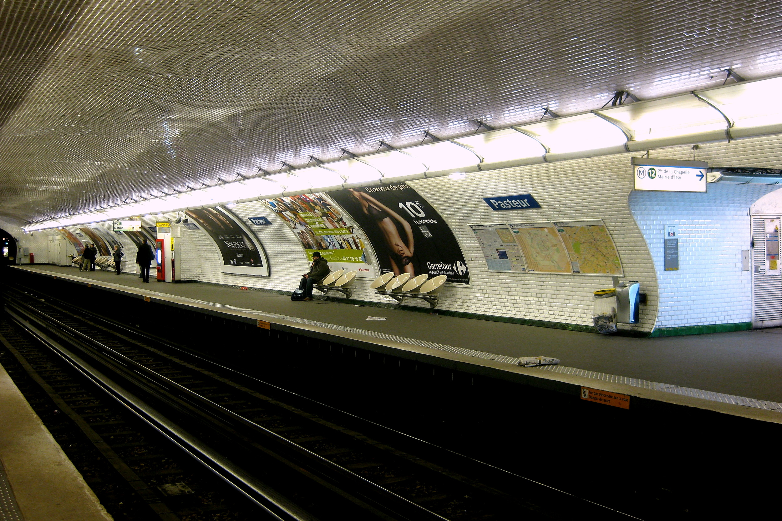 Quai direction Nation de la station Pasteur du métro de Paris.